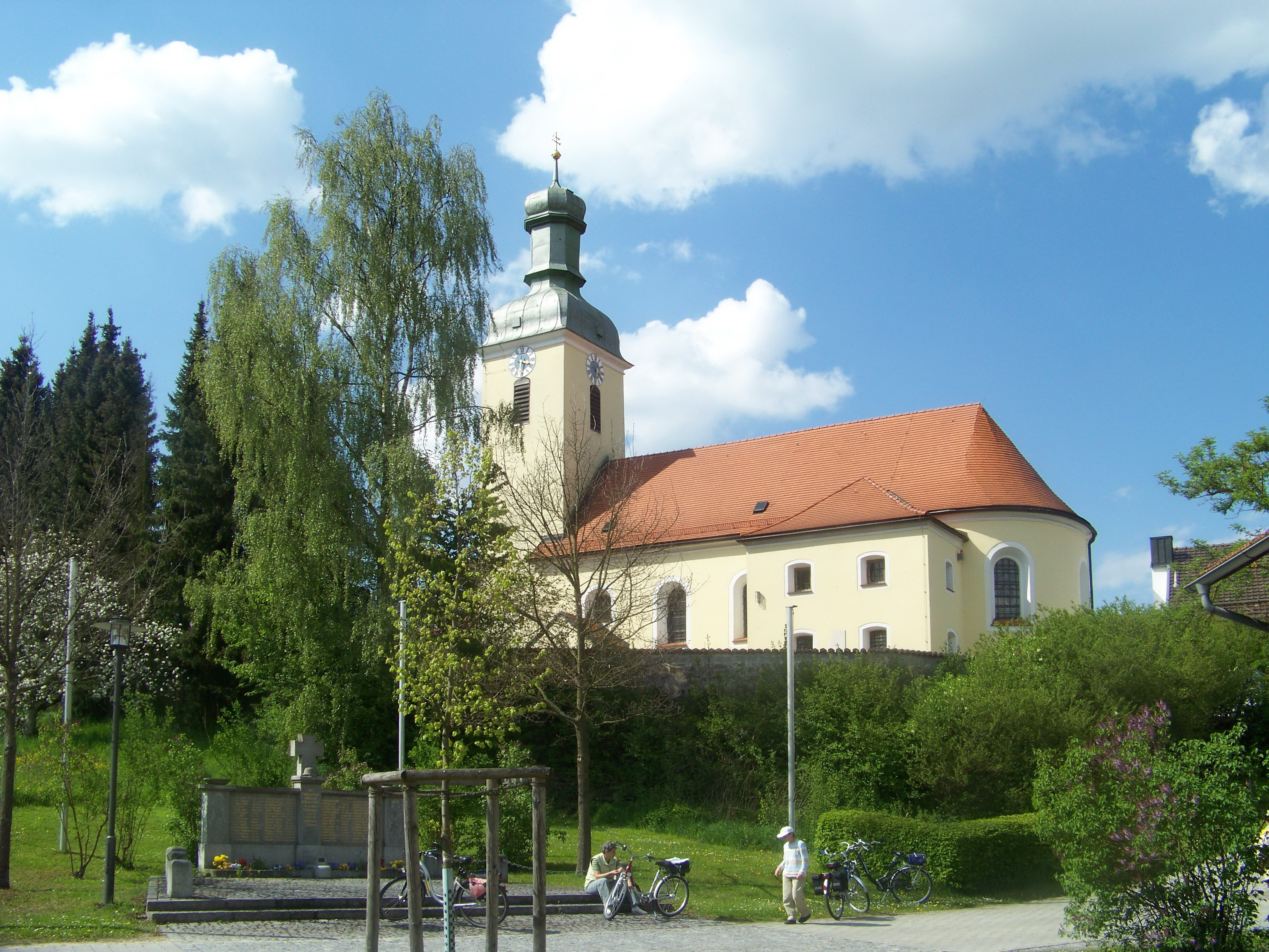 Rattiszell, Kirchstraße 3. Katholische Pfarrkirche Sankt Benedikt. Bau von 1697, Turmunterbau spätgotisch, mit Ausstattung, Friedhofskapelle, nachmittelalterlich.